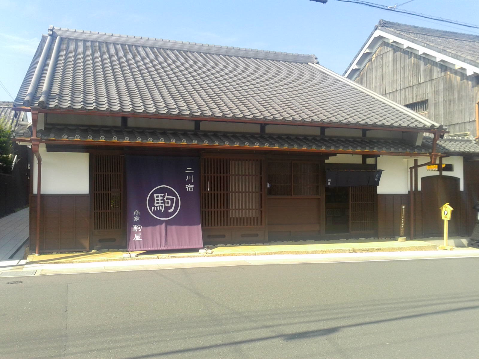 二川 商家『駒屋』